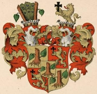 Taube suguvõsa vabahärravapp (Kuramaa)